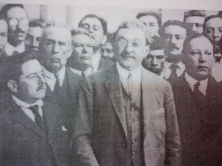 Fotografía de Juan Bautista Bascary primer gobernador Radical de Tucumán